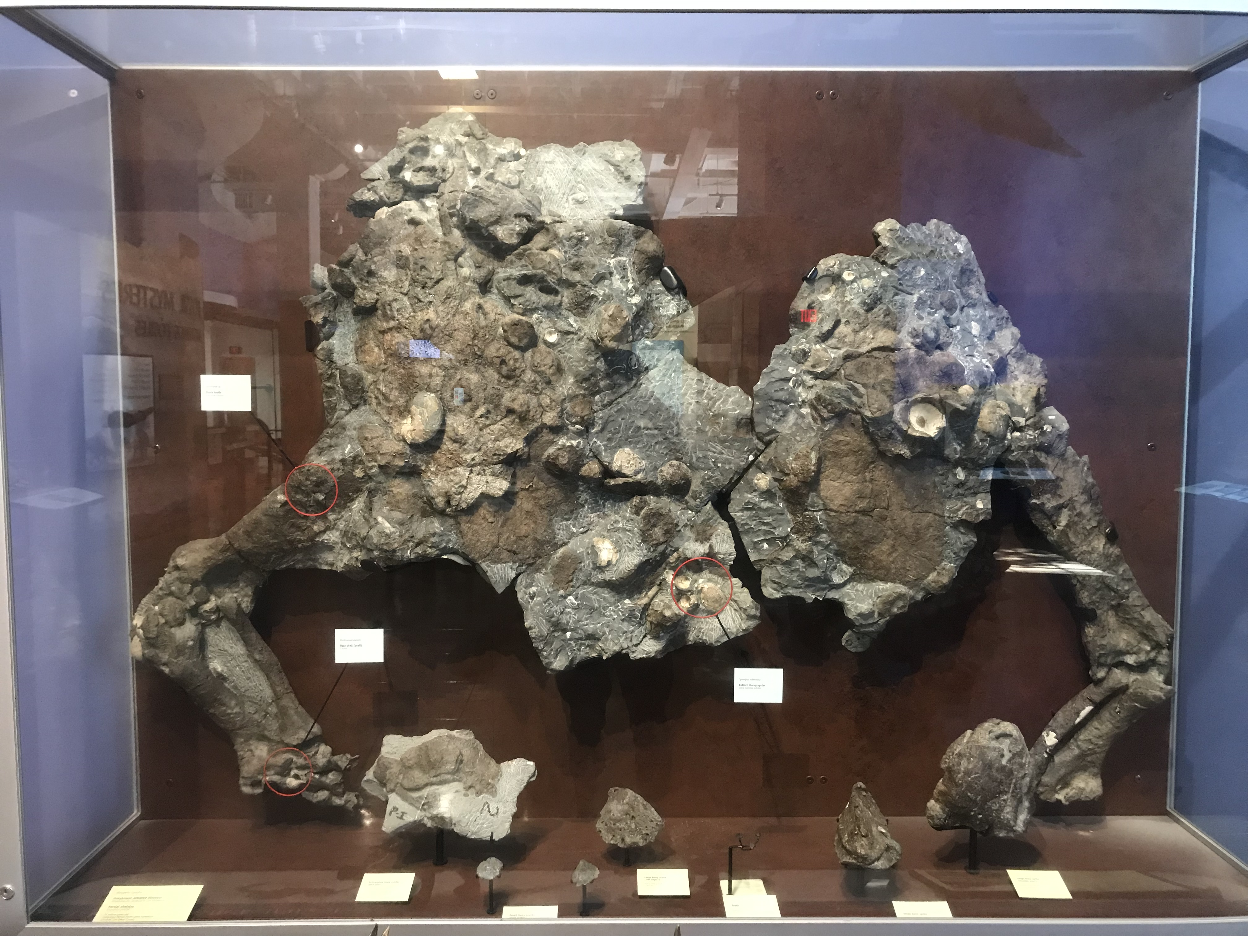 アレトペルタ・クームジ ホロタイプ